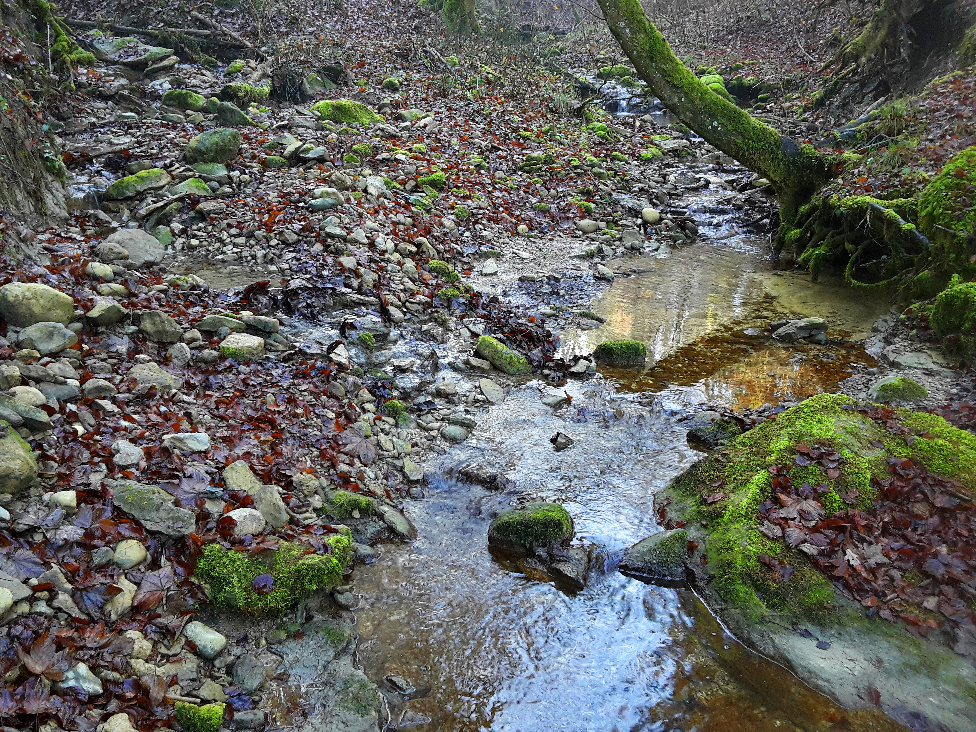 Geissweidbach (rechts) mündet in den Lunnerenbach (links) auf der Kantonsgrenze von Zürich und Aargau im Gruenhaldentobel